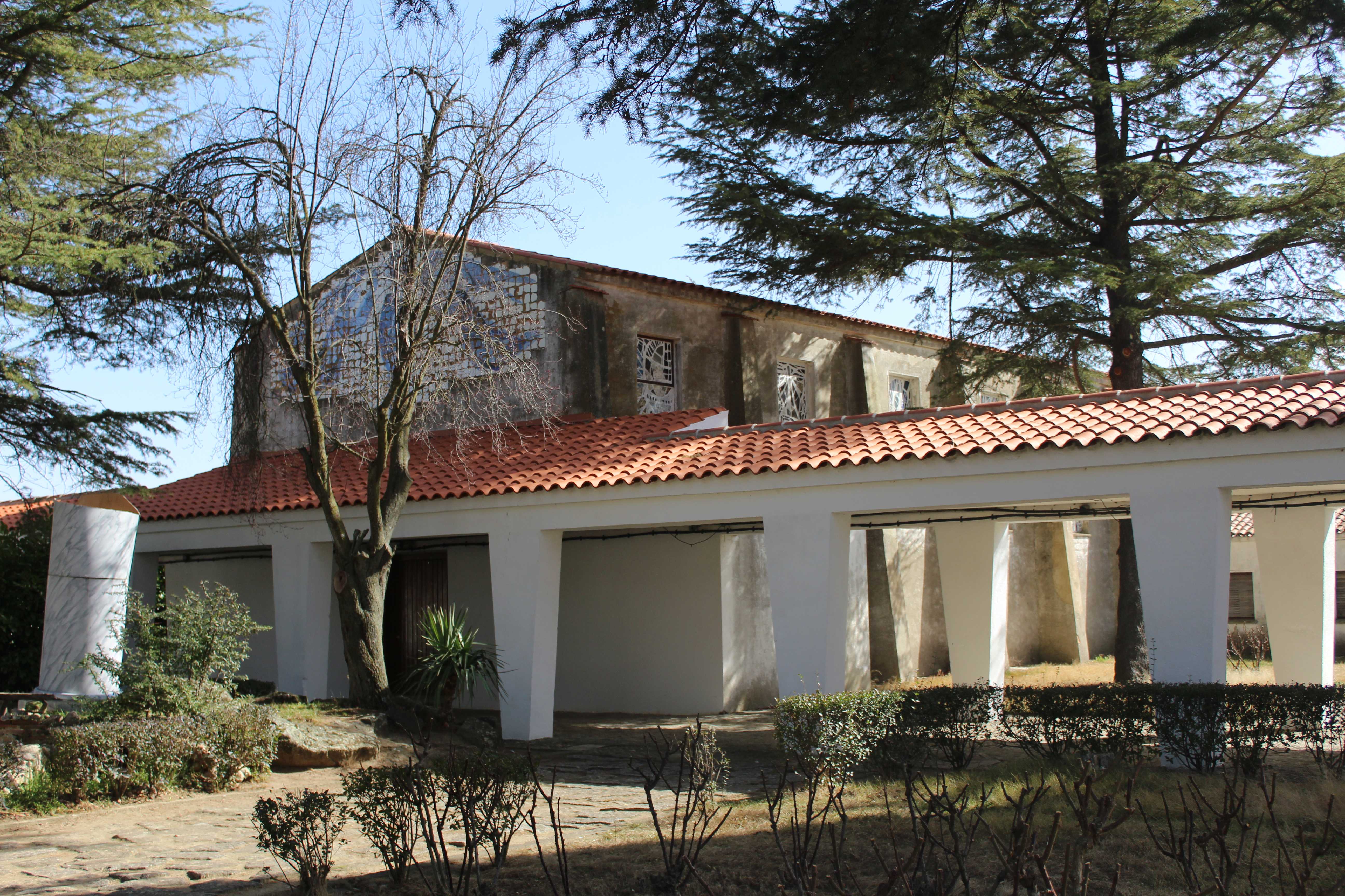 Iglesia parroquial